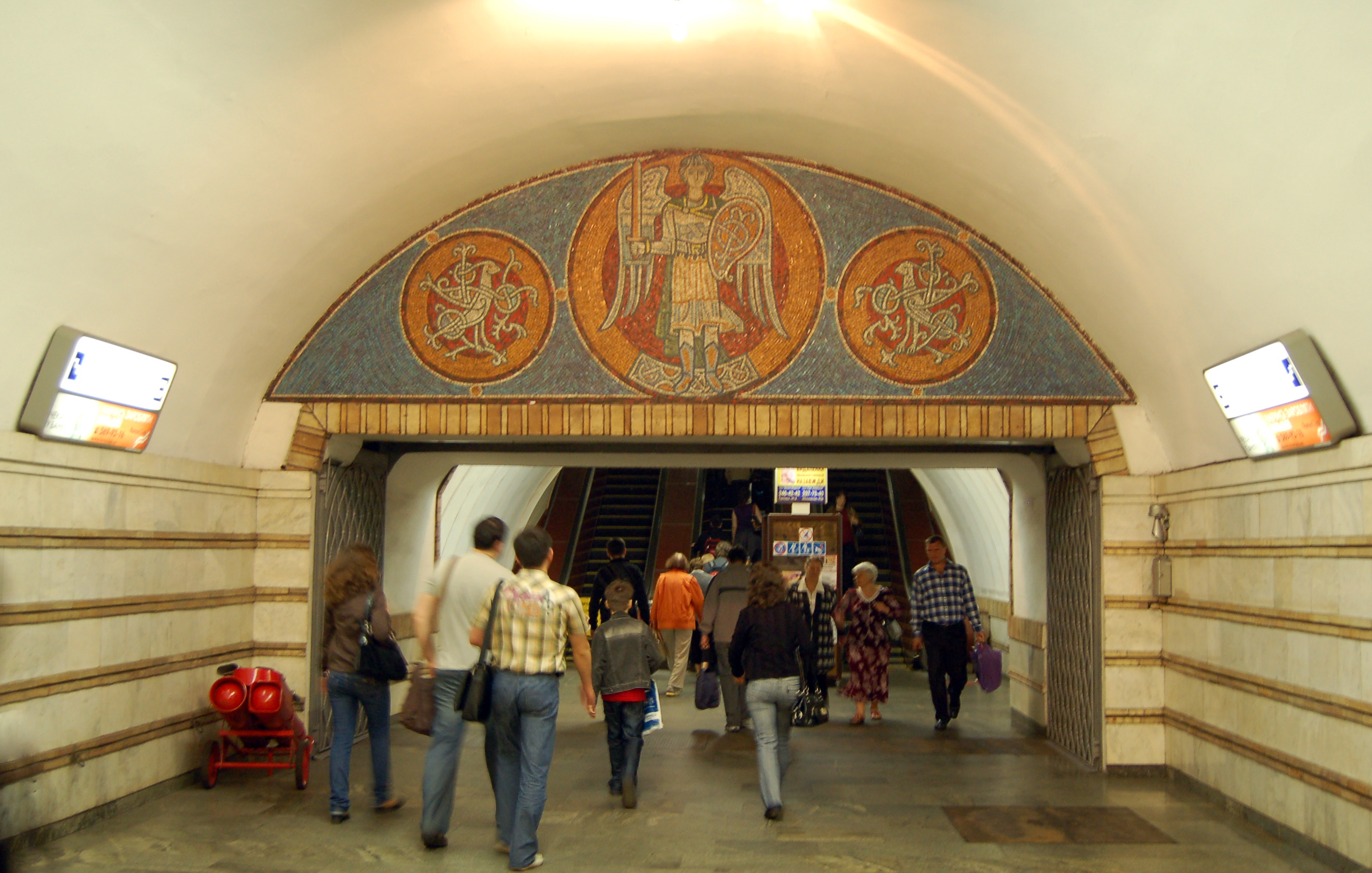 Cтанция метро «Золотые ворота», мозаика около эскалаторного тоннеля